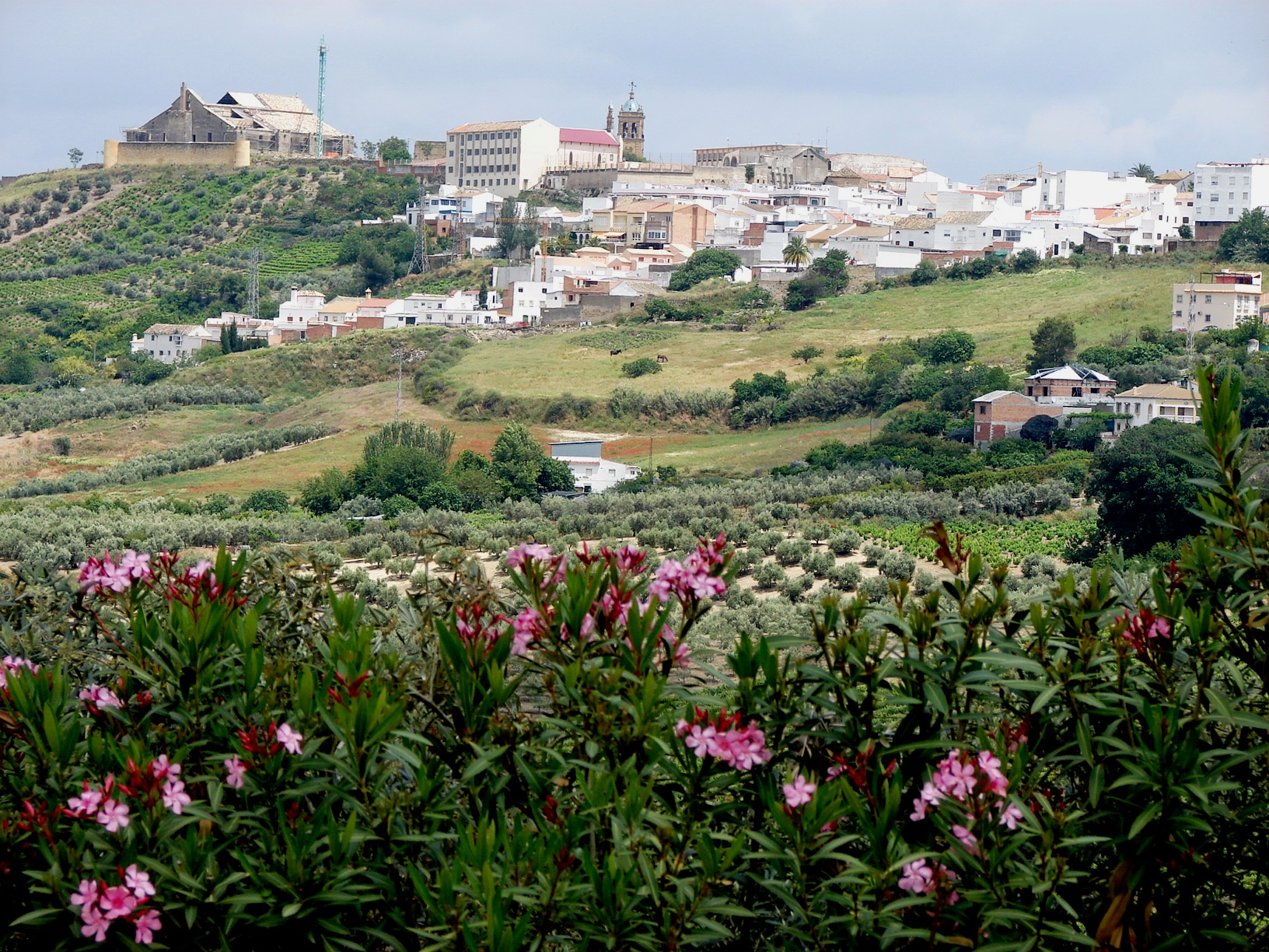 Vista de Montilla (Córdoba, España).